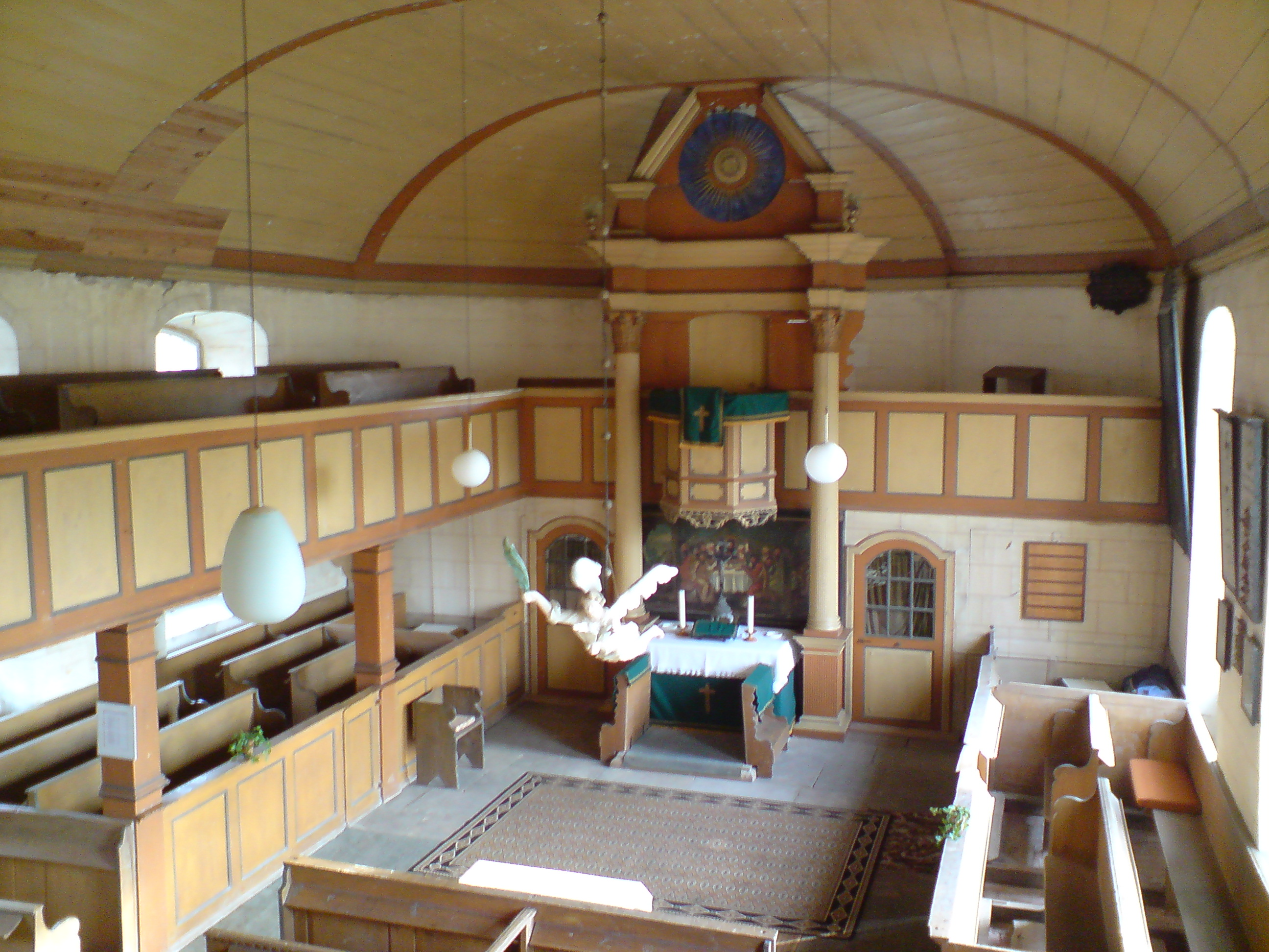 Kirche Eschenrode